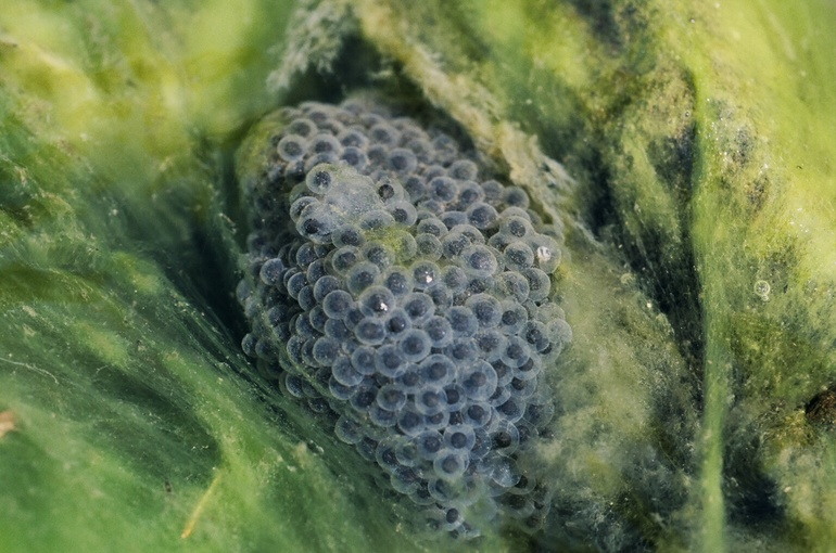 Rana boylii